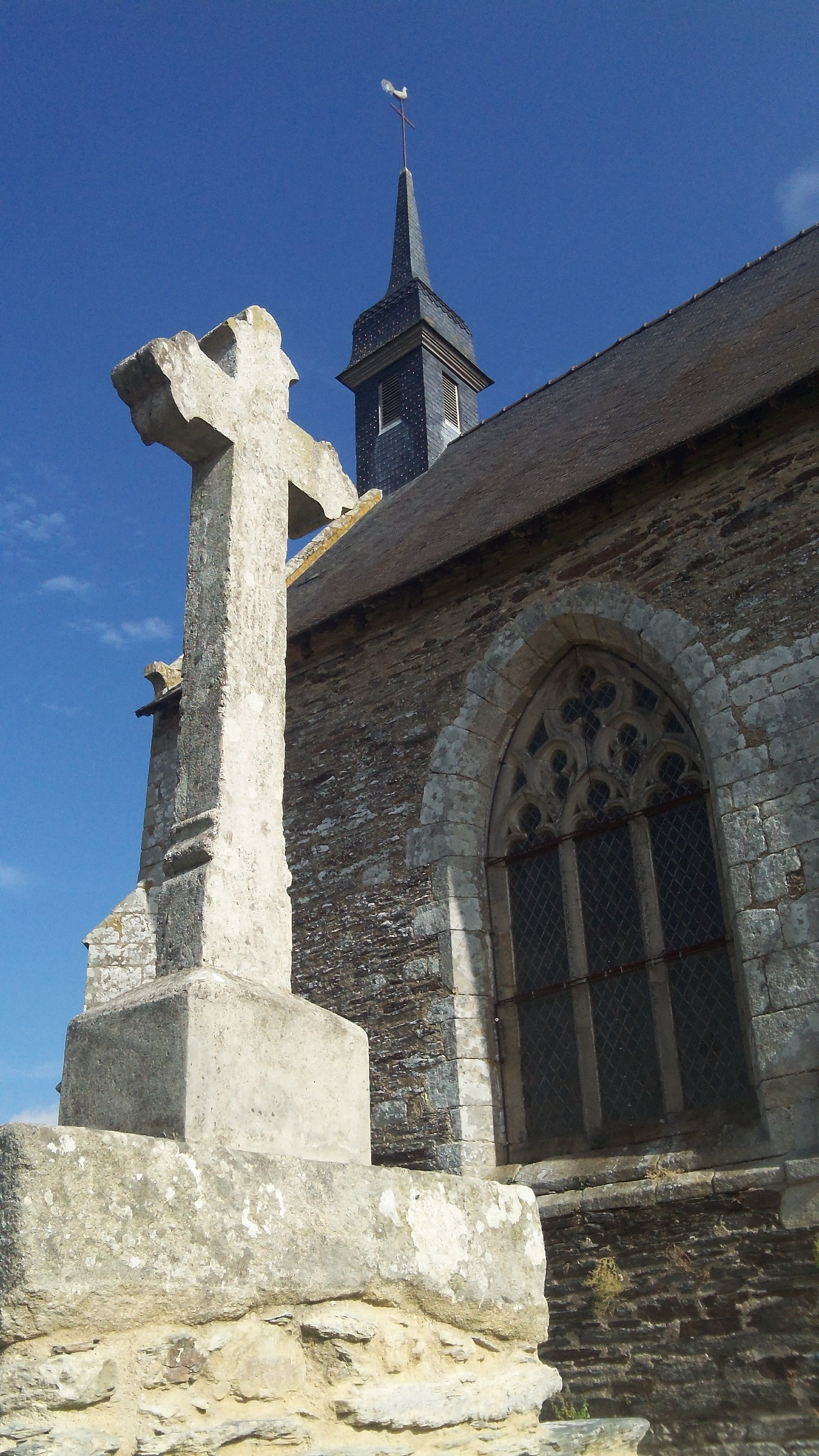 Chapelle Saint-Antoine (inscrit) et sa croix .